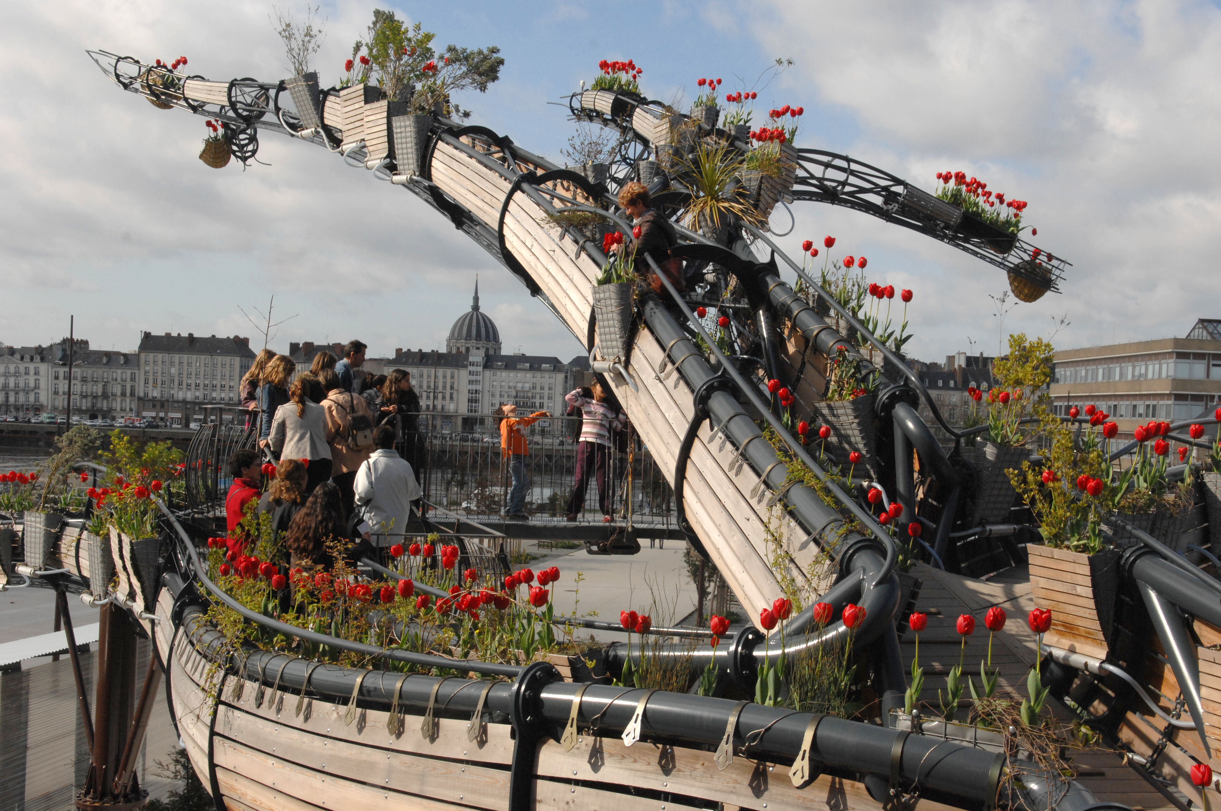 Branche prototype de l'Arbre aux Hérons Les Machines de l'île DR (c)Nautilus/Jean-Dominique Billaud